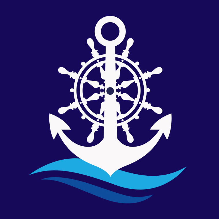 הסמל החדש של עמותת חיל הים